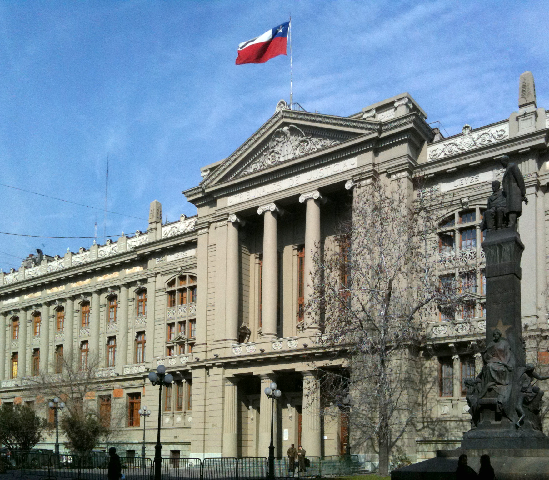 Palacio de los Tribunales de Justicia de Santiago de Chile (restaurado recientemente)